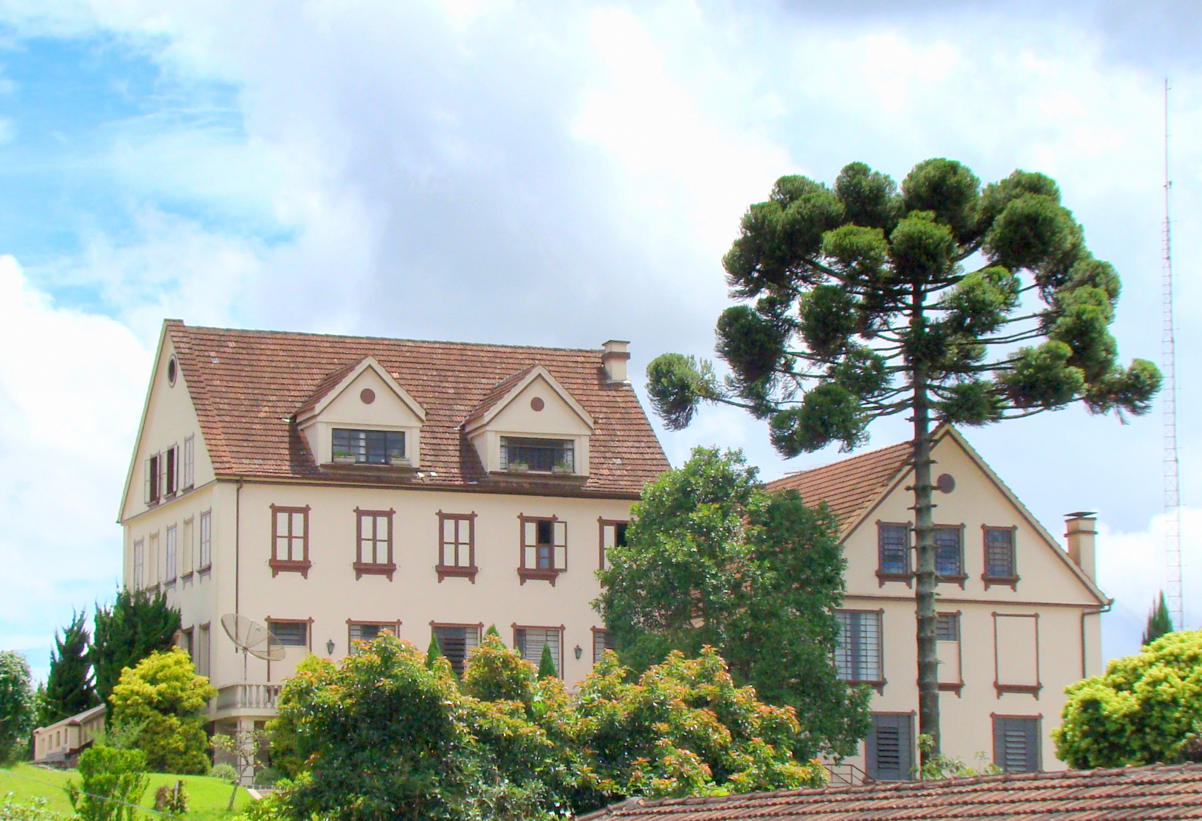 Casa das Irmãs Passionistas em Colombo (município da Grande Curitiba), Paraná, Sul do Brasil.